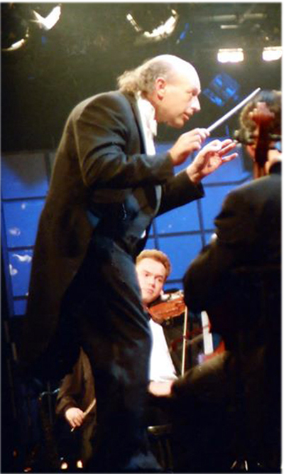 דורון סלומון מנצח על תזמורת